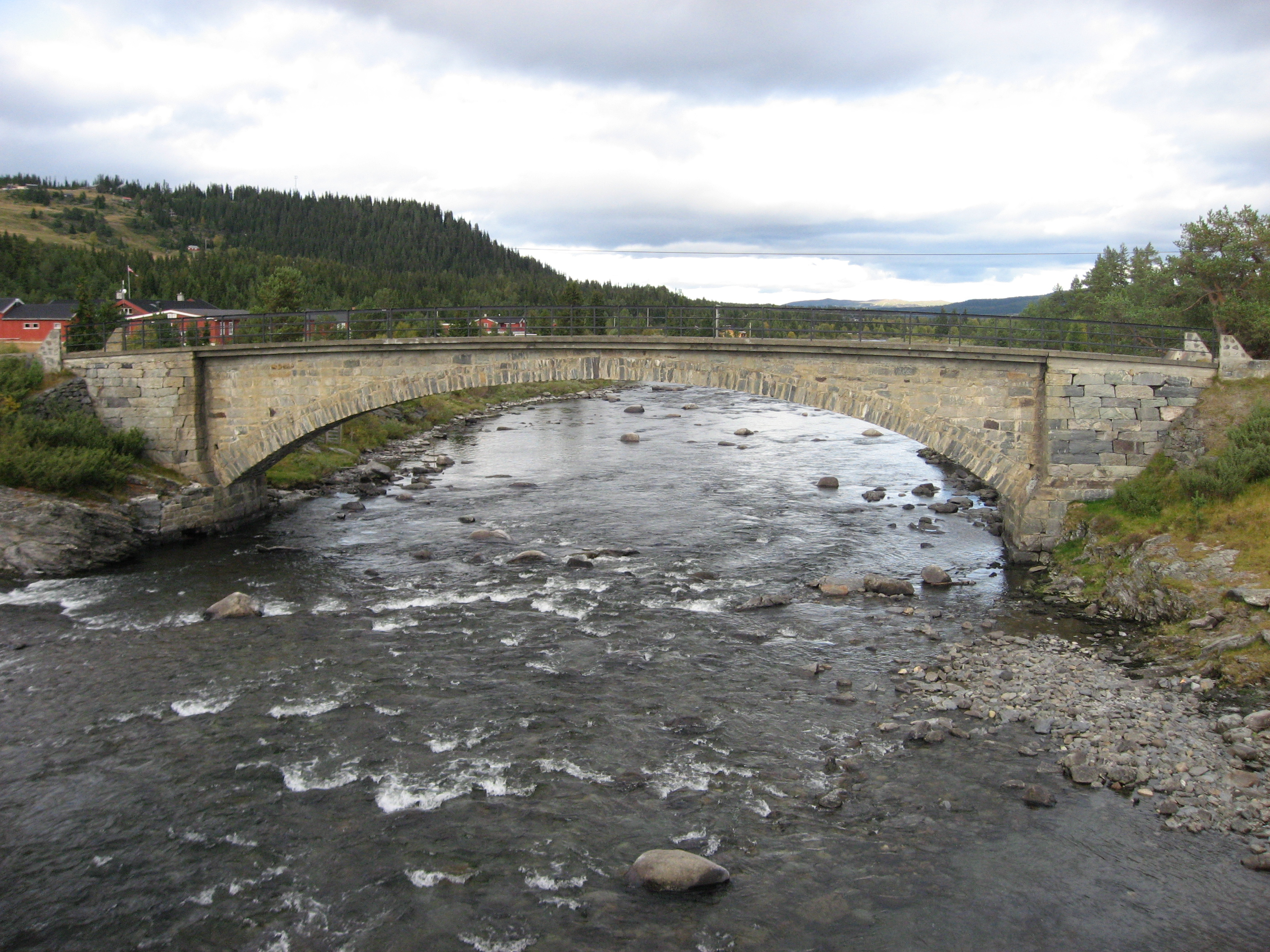 Gamle Ormhamar bru.